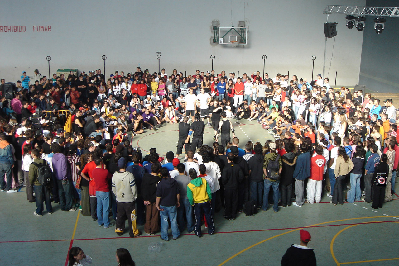 Circle o corro de Bboying (Break Dance), en el Hip Hop Festival Serious Side II, en Santamarta de Tormes (Salamanca)